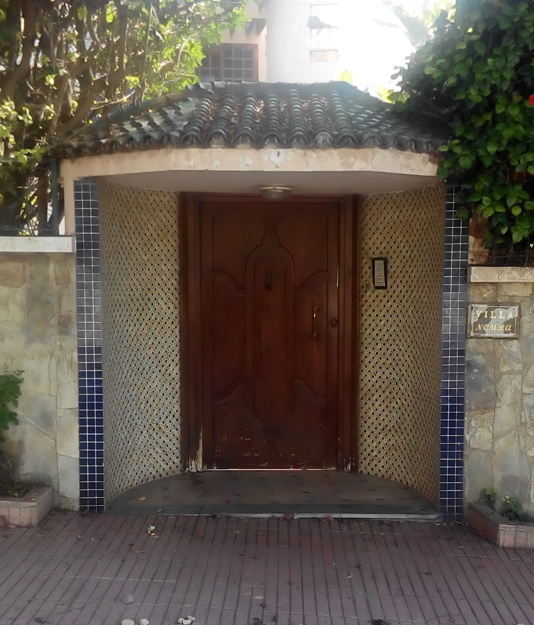 Agadir (2017), Schweizer Viertel (Portal)